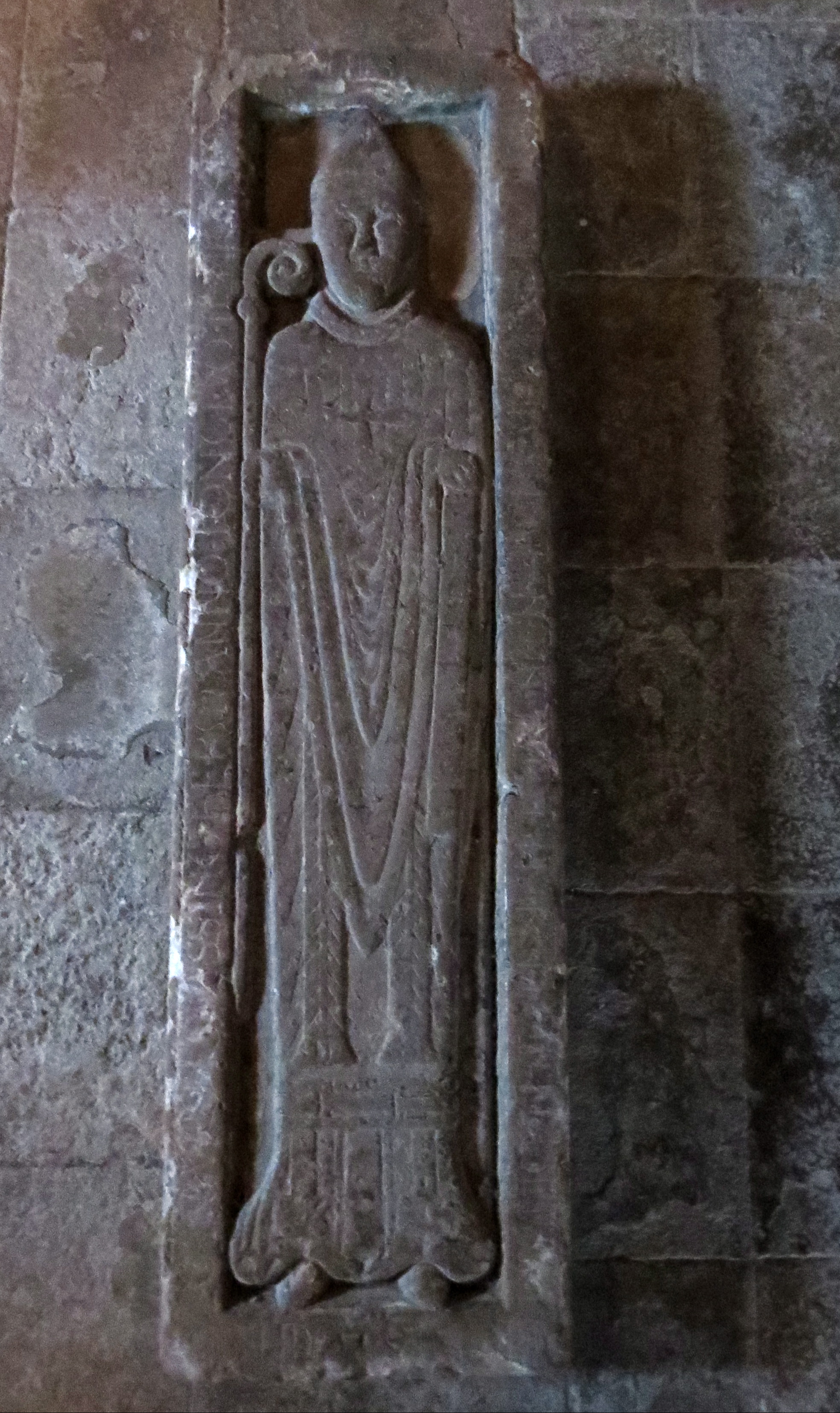 Herman (ca. 1100-1150), kannik i Lund og biskop af Slesvig. Gravsten formentlig udført af Carl Stenmester. Fra Lund Domkirkes krypt.